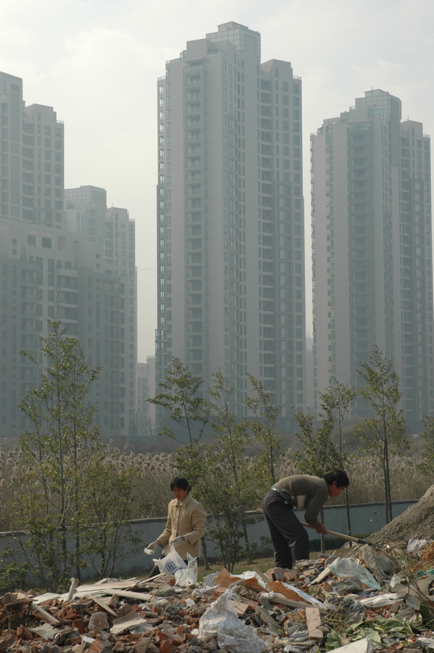 Shanghai, China